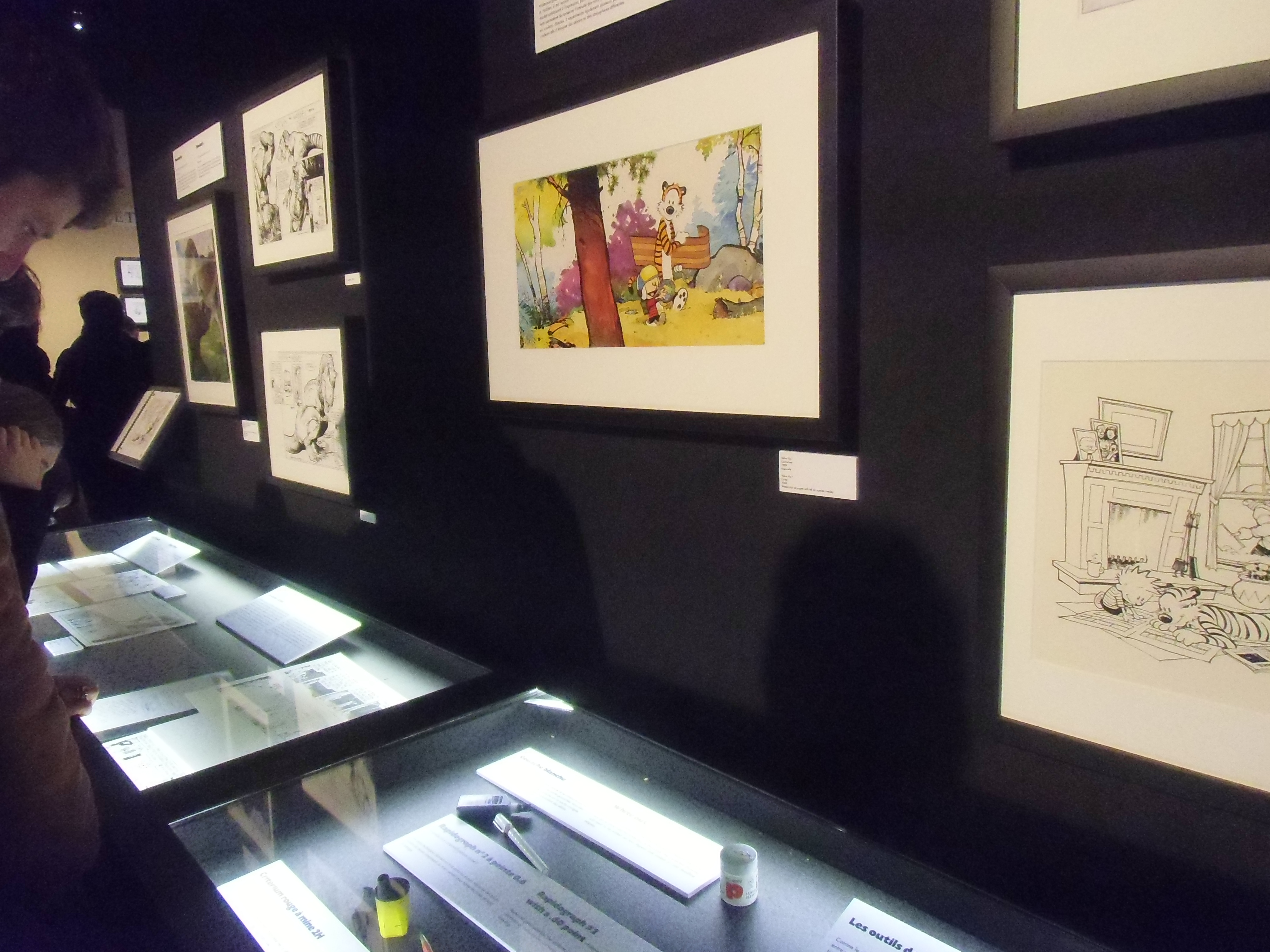 Exposition A la Recherche de Calvin et Hobbes, FIBD 2015.